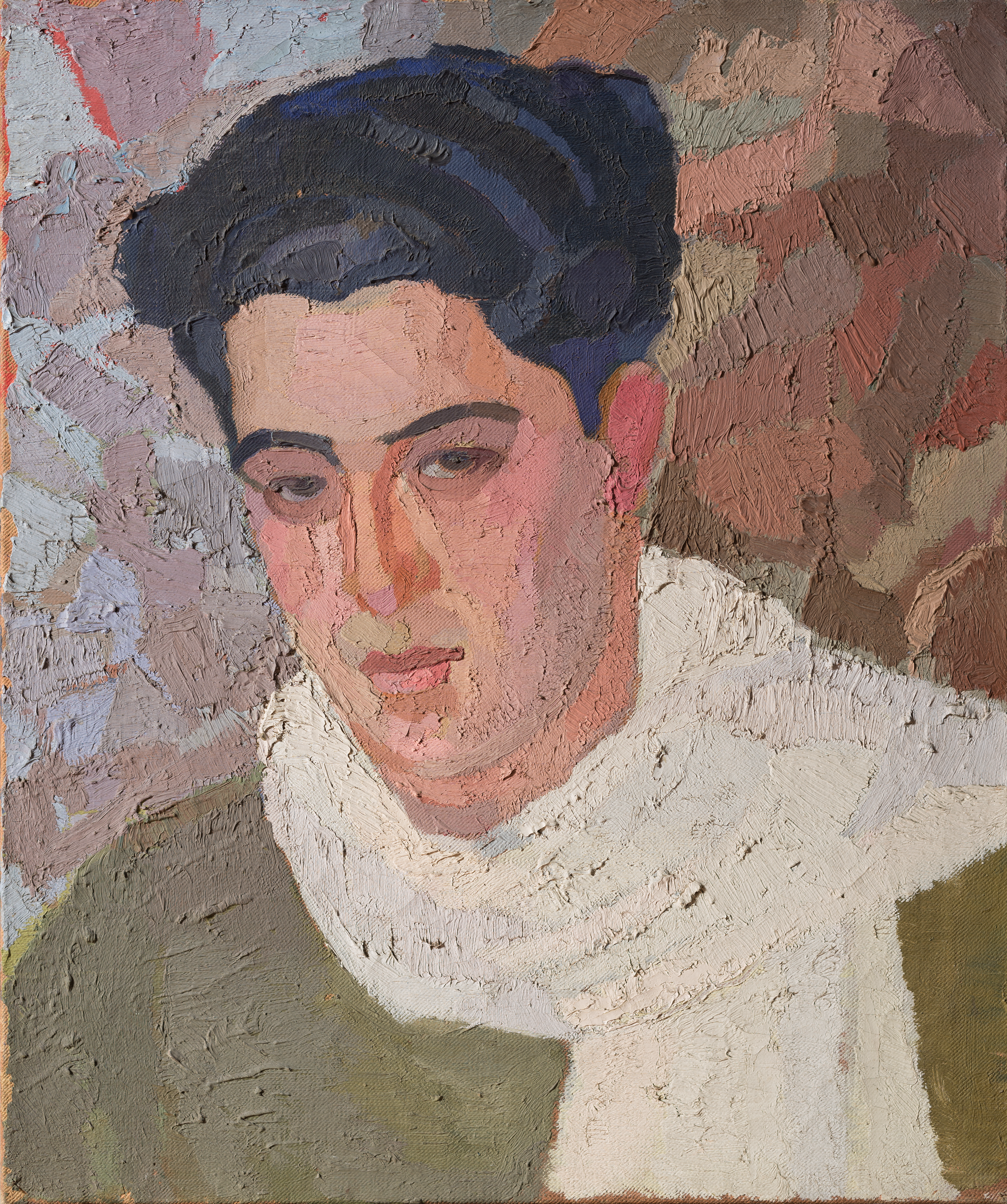 Obra "Retrato del pintor Vieytes" del pintor uruguayo Guillermo Laborde. Óleo sobre tela de 55 cm. de alto x 46 cm. de ancho. Fotografía de la obra tomada por Eduardo Baldizan.